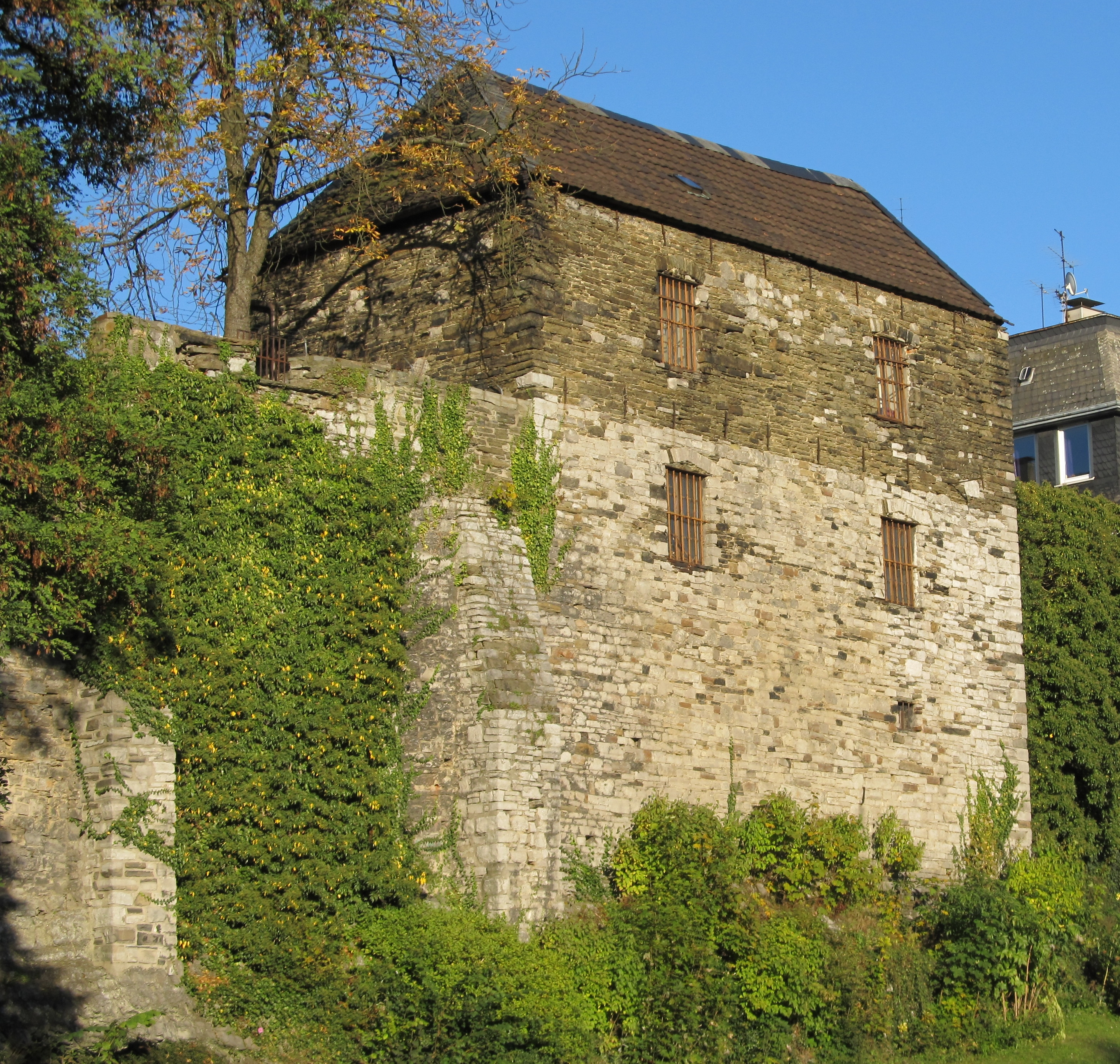 Ehemaliger Burgmannshof, Iserlohn (Germany)